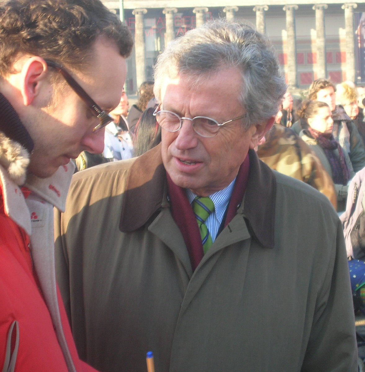 Wilhelm von Boddien, Geschäftsführer des Fördervereins Berliner Schloss e. V. auf der Demonstration "Stoppt den Palastabriss" am 14. Januar 2006 im Gespräch mit einem Journalisten